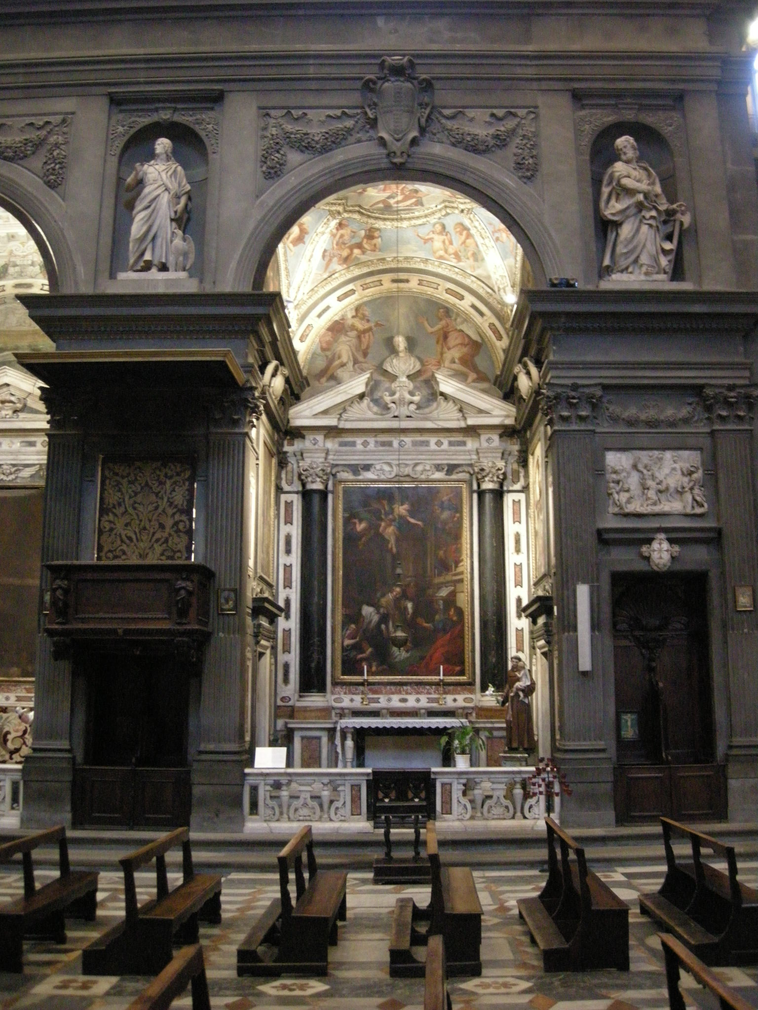 Cappella ardinghelli 00